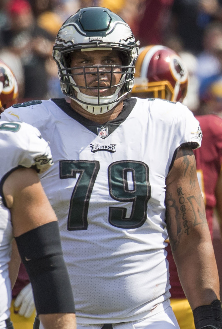 Eagles at Redskins 9/10/17